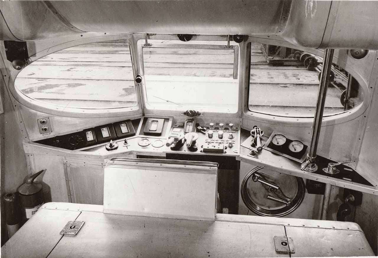 Кабина дизель-поезда ДП «Розария» (трёхвагонный).